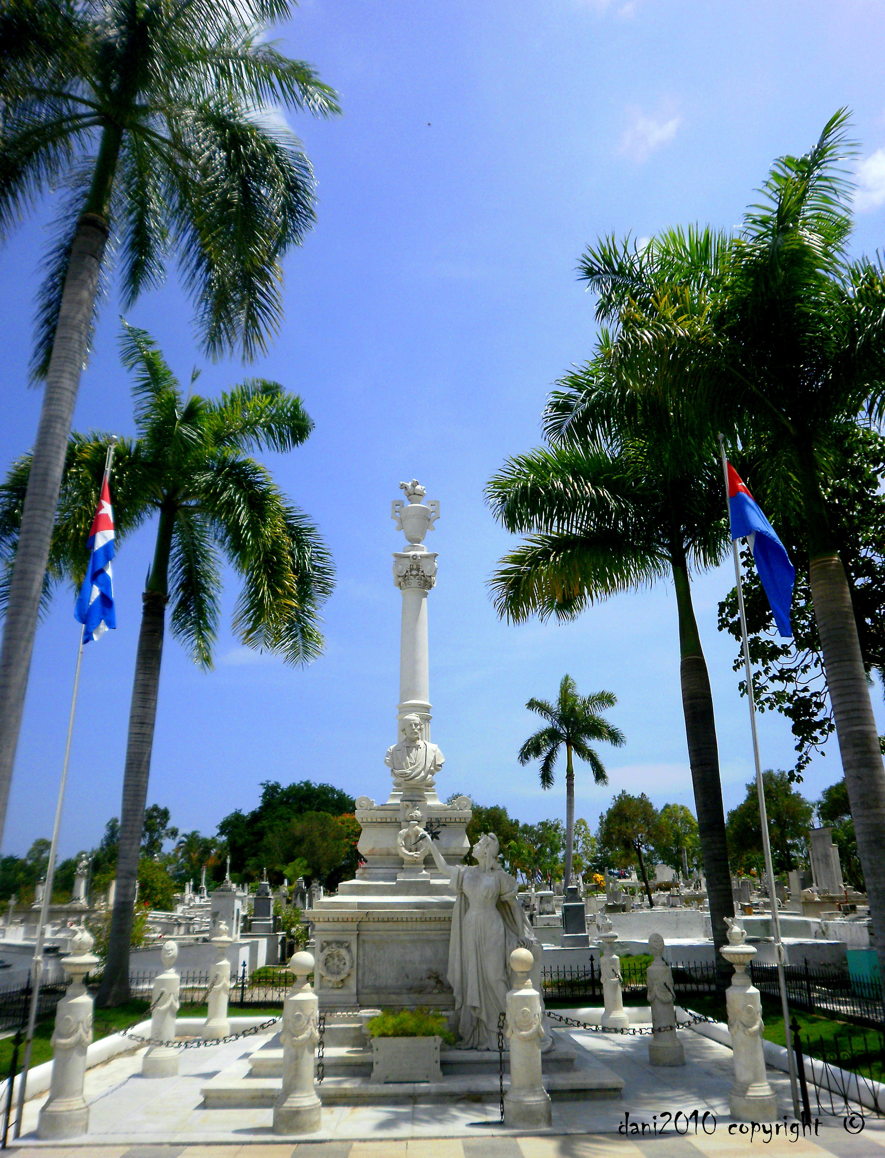 Abajo, en el subsuelo yace Carlos Manuel de Céspedes descansando en la cripta